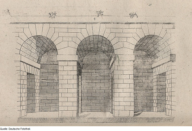 Original image description from the Deutsche Fotothek Architektur & toskanische Ordnung & Bogen